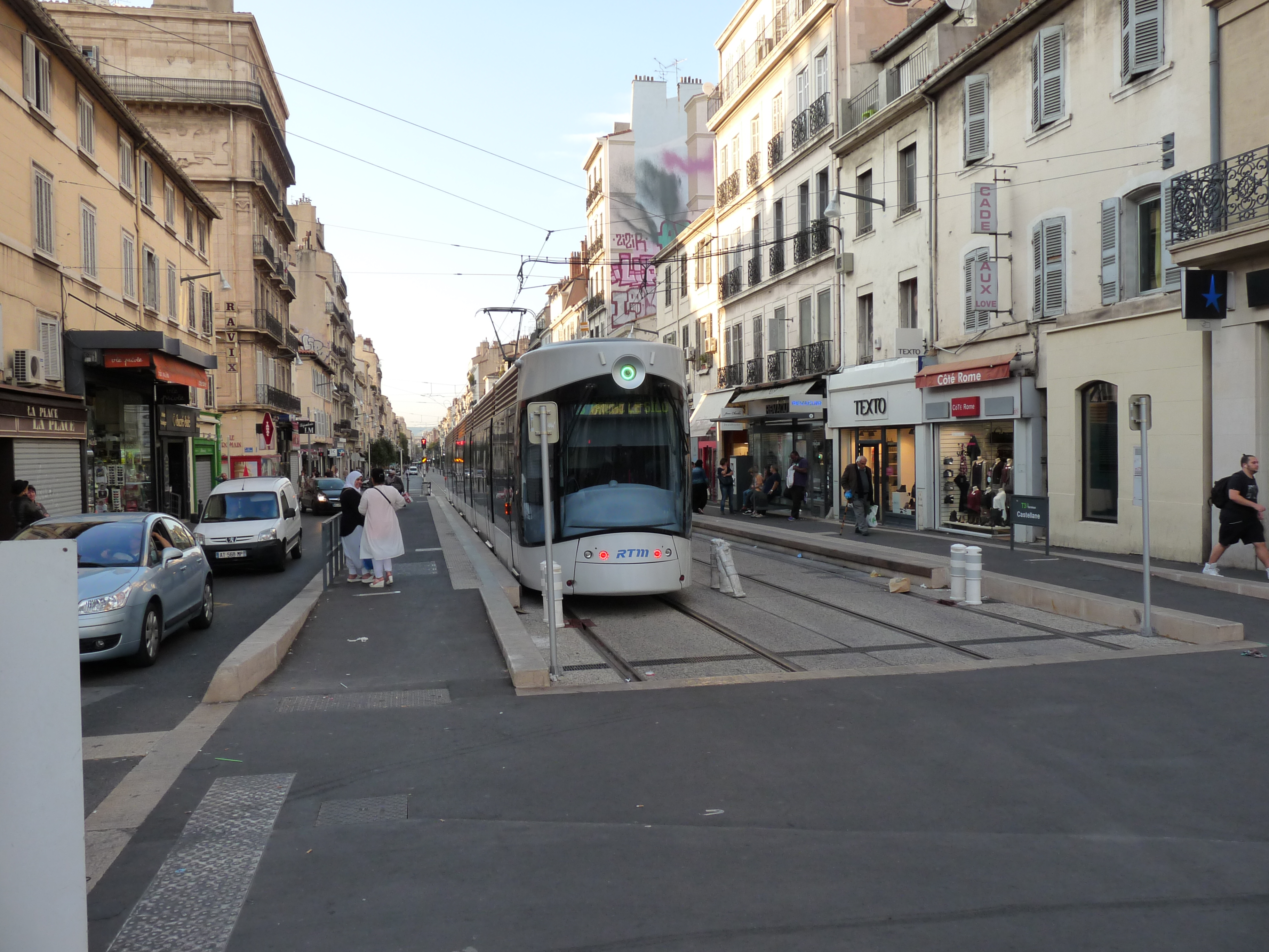 Eindpunt tramlijn T3